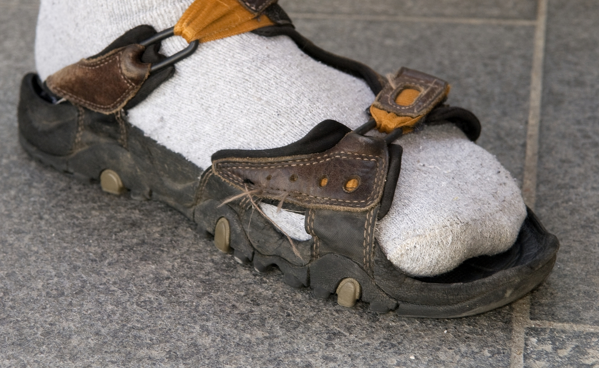 Dokumentation av ungdomsmode i Täby enskilda gymnasium hösten 2009. Tubsocka och sandal.